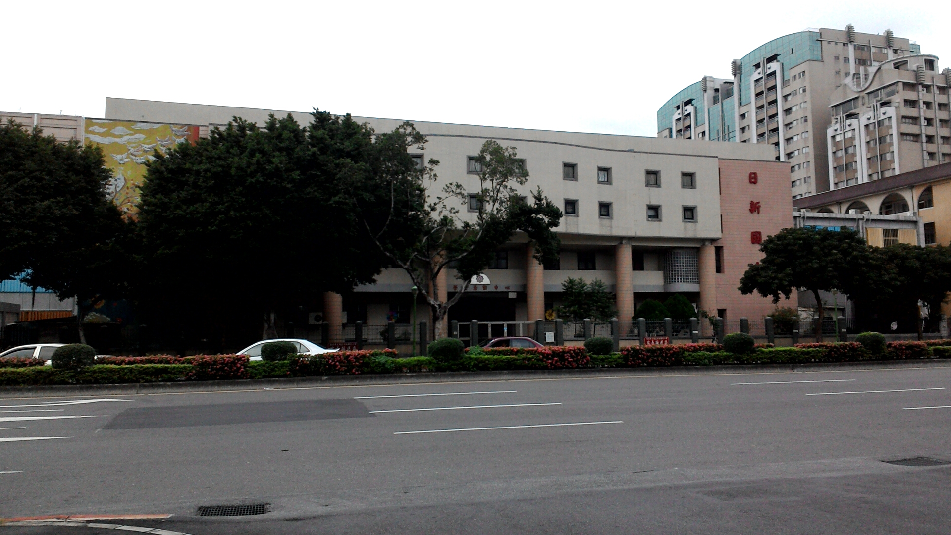 臺北市大同區日新國民小學